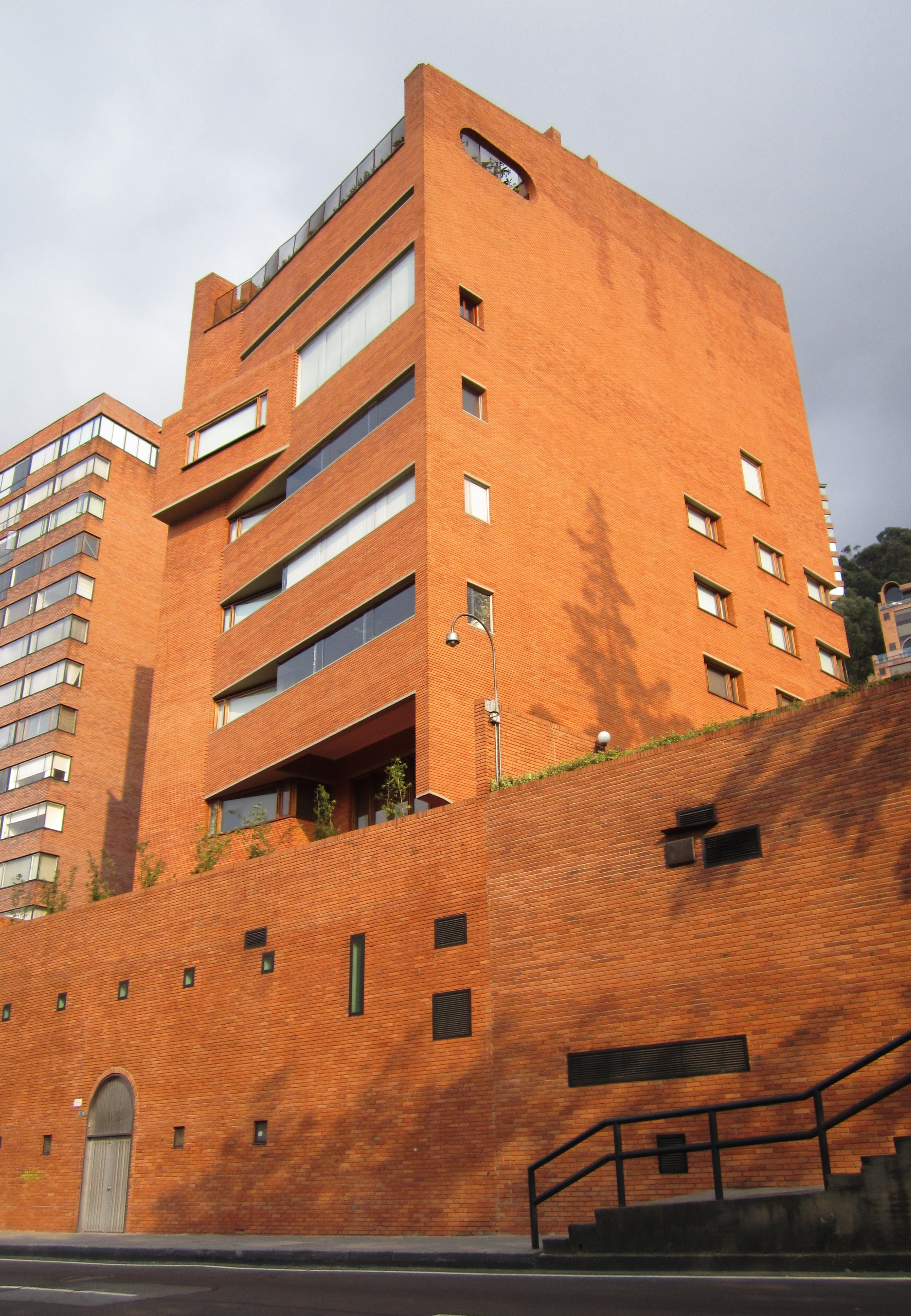 Edificio de ladrillo en el barrio El Refugio, carrera 7 con calle 88. Zona nororiental de localidad de Chapinero, en la ciudad de Bogotá.